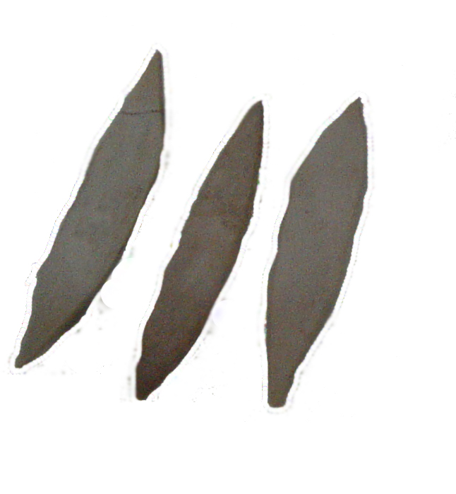 Werkzeuge aus dem kretischen Neolithikum.